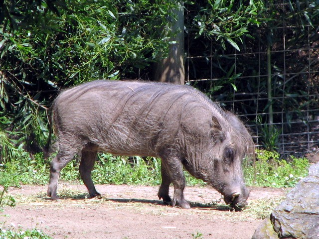 Loài Phacochoerus aethiopicus